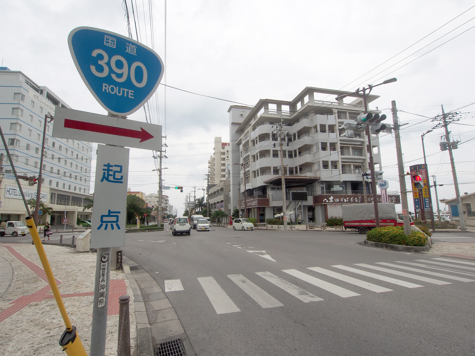 国道390号石垣市内起点（沖縄県石垣市石垣島）